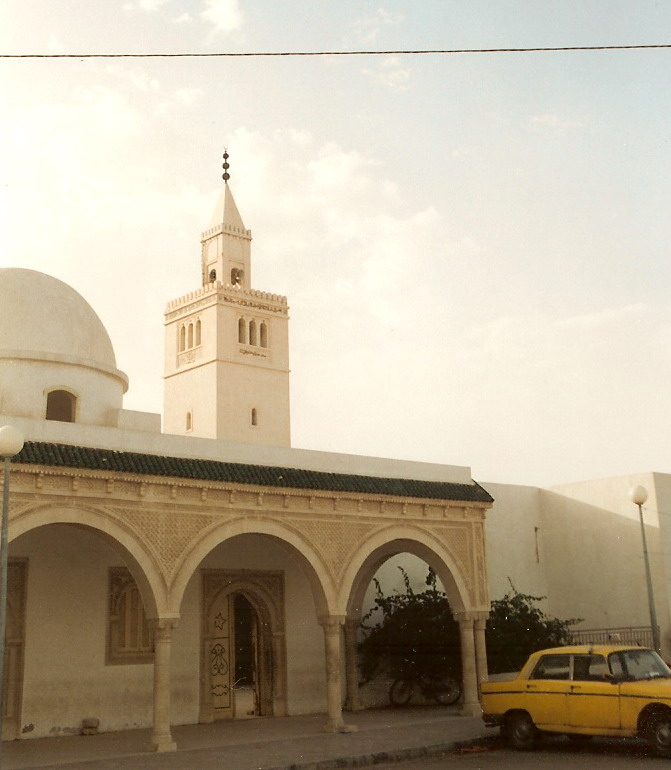 Mosquée à Gabès (Tunisie)